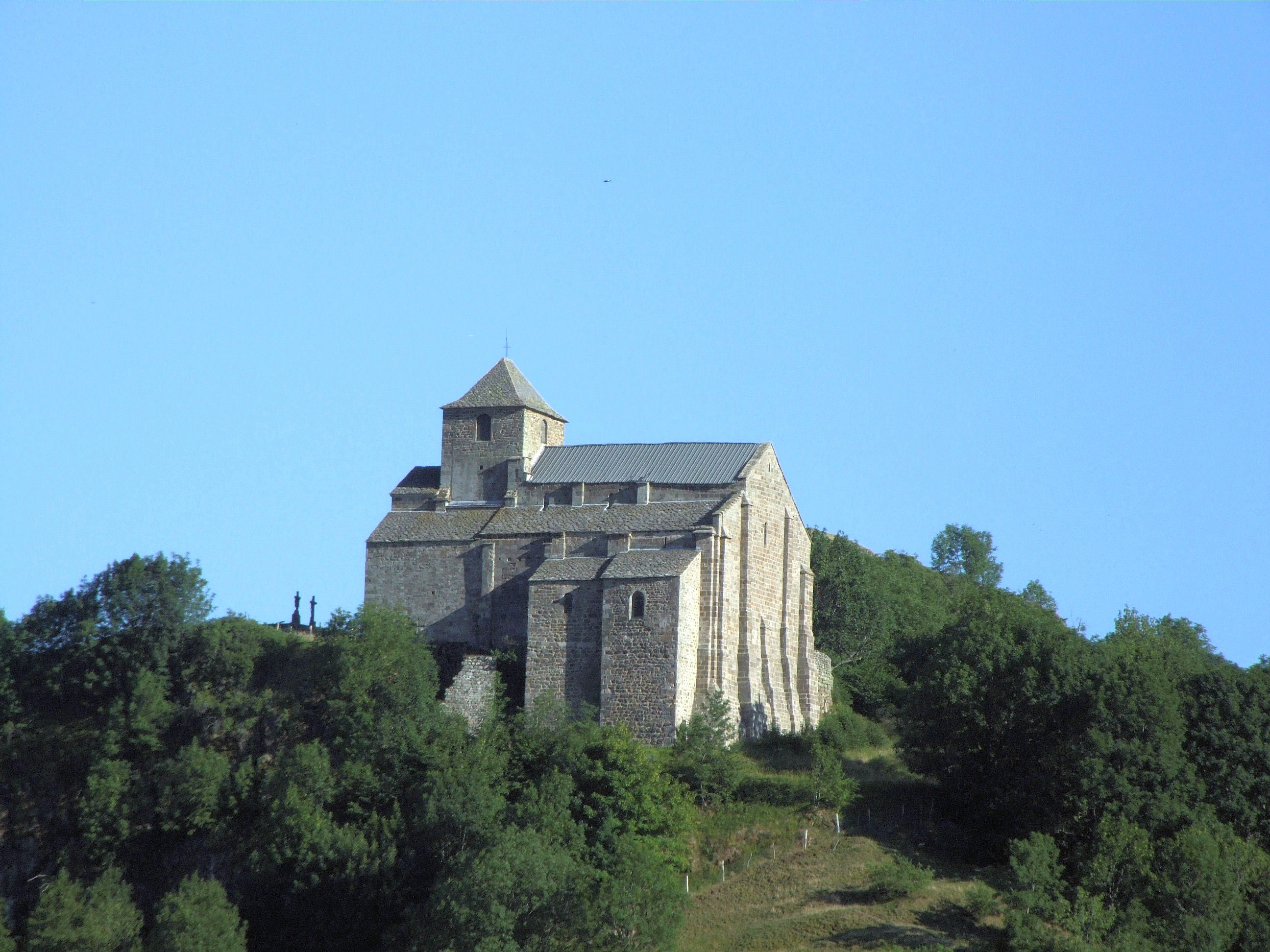 Albepierre-Bredons - Eglise Saint-Pierre de Bredons -1